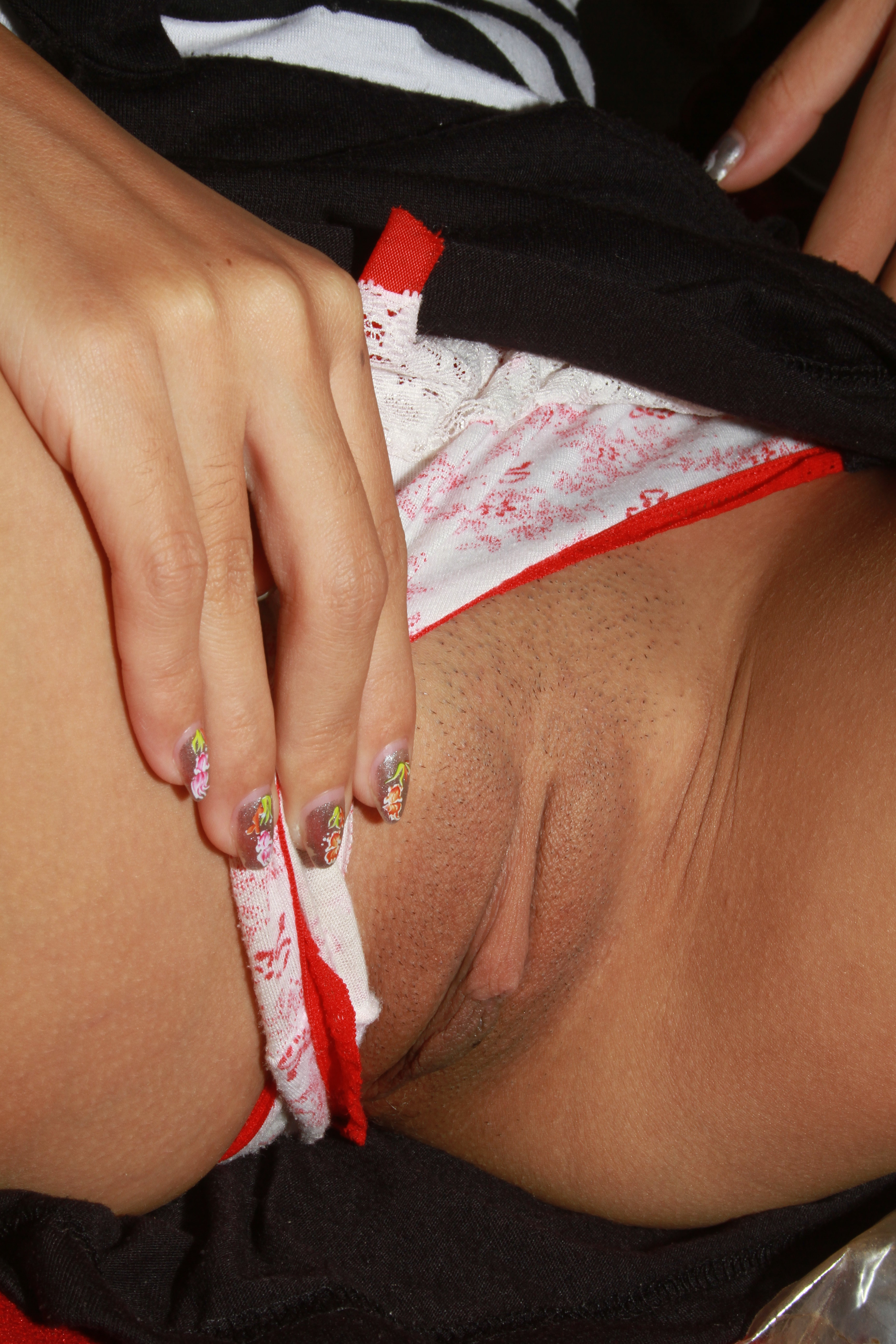 Zur Seite geschobene Unterhose gibt Blick auf weiblichen Intimbereich frei.